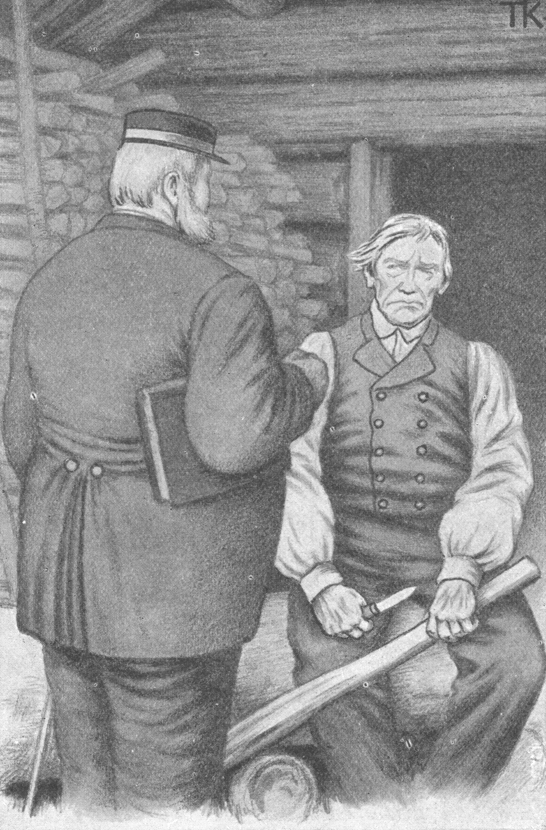 Illustrasjon til folkeeventyret «God dag, mann!» – «Økseskaft» Scanned illustration from 1936 edition of Asbjørnsen & Moe: Samlede eventyr. Norske kunstneres billedutgave. Gyldendal Norsk forlag.